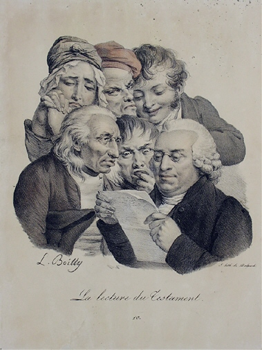 La lecture du testament; lithographie; 31 x 24 cm